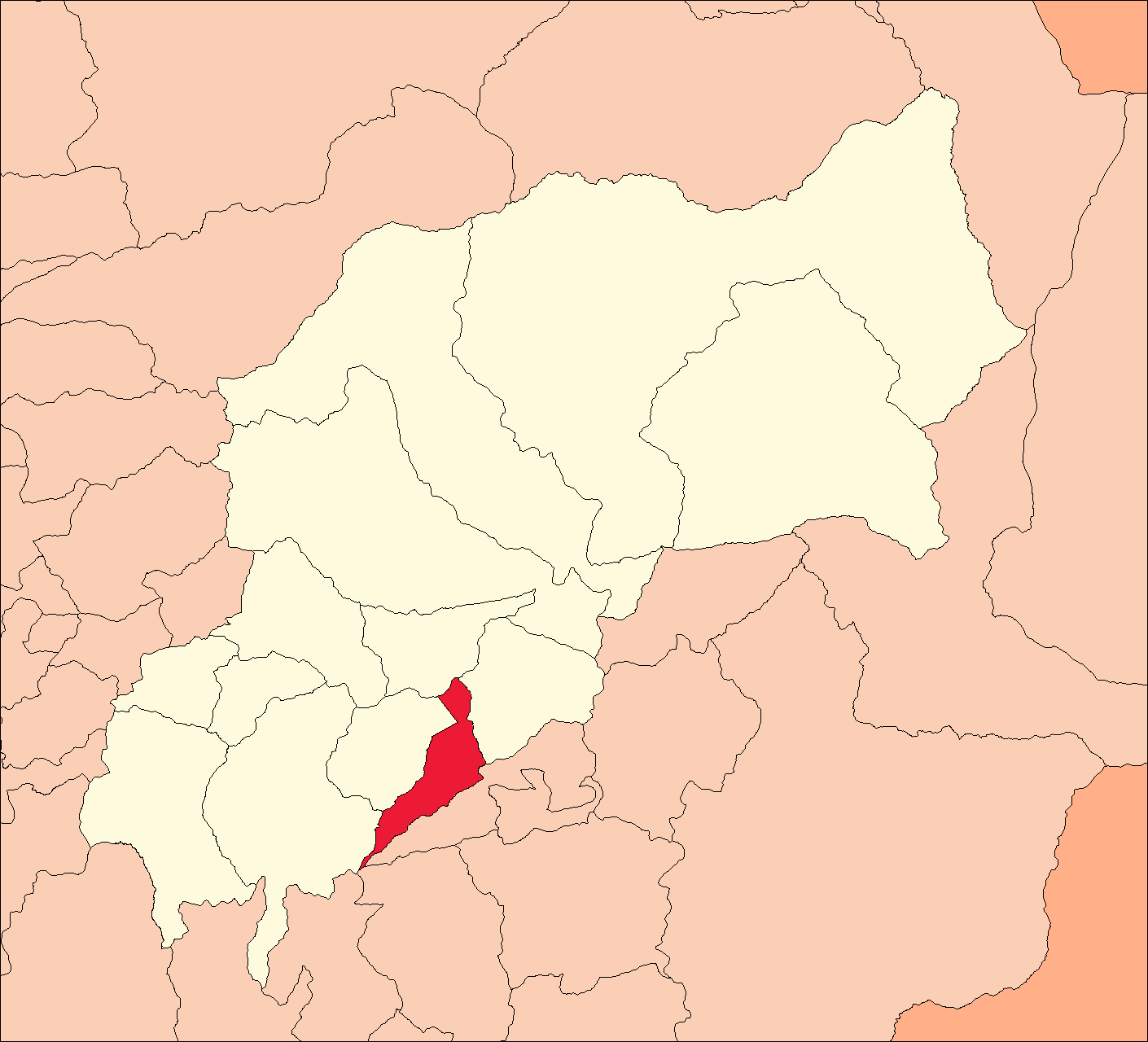 Área del distrito de Pillco.